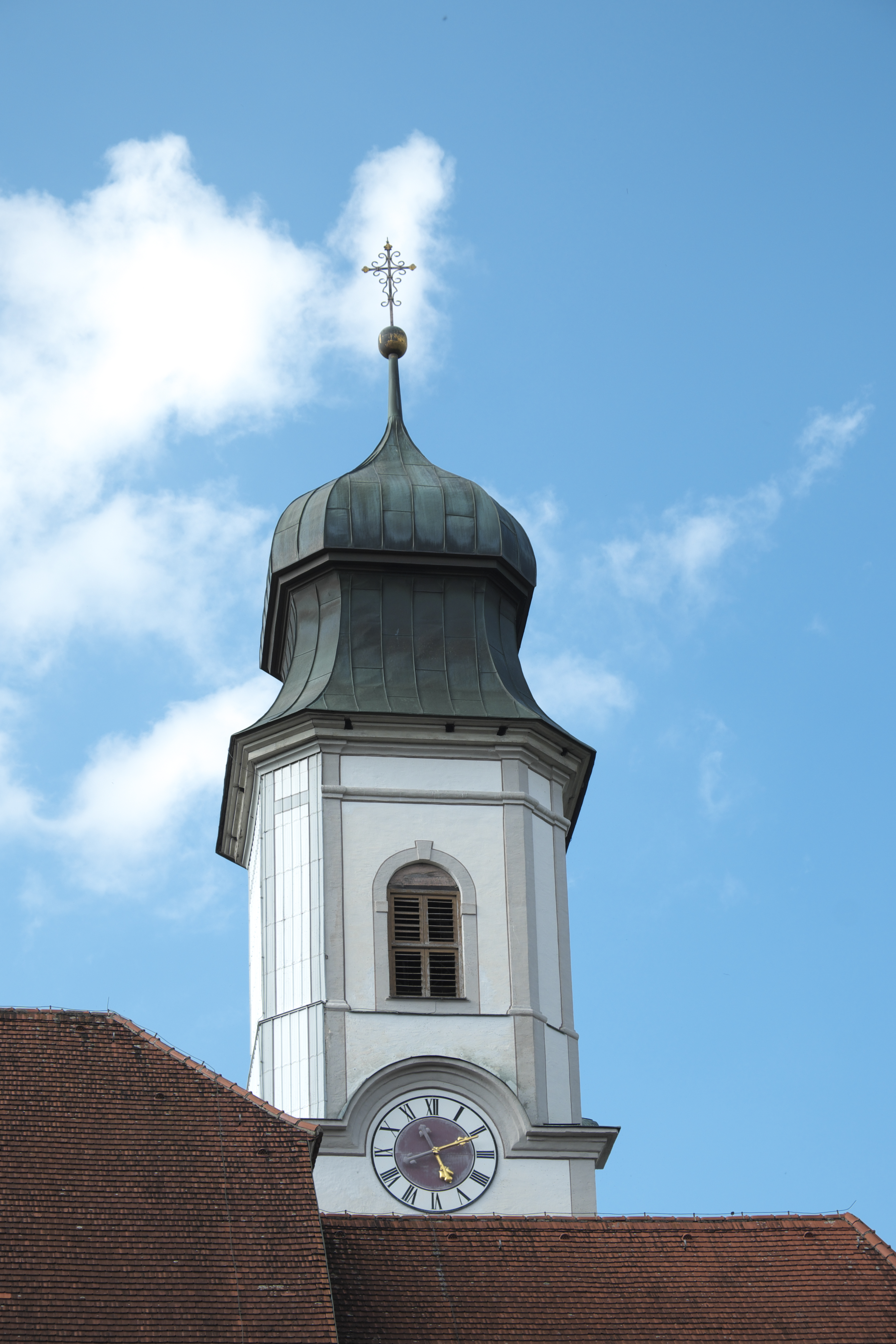 Katholische Pfarrkirche Mariä Heimsuchung in Lechbruck am See im Landkreis Ostallgäu (Bayern/Deutschland), Glockenturm